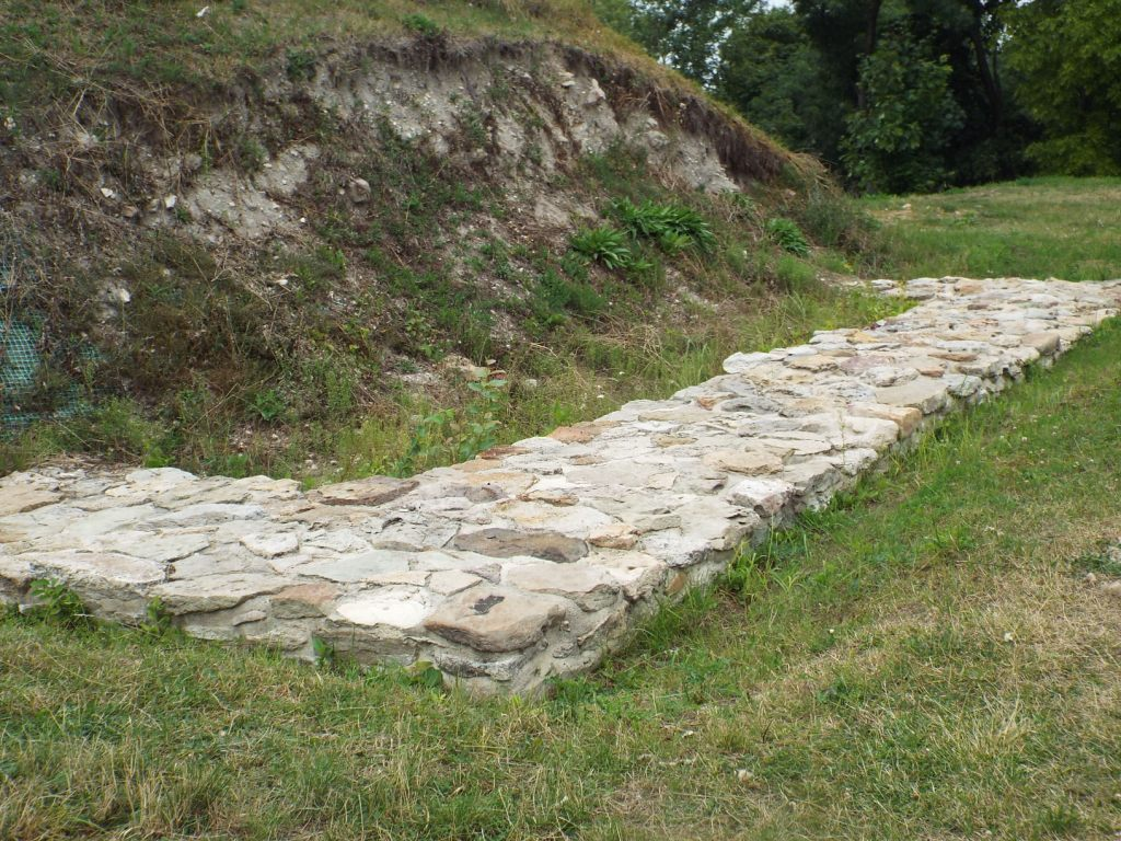 Grodzisko Wysoka Górka w Chełmie